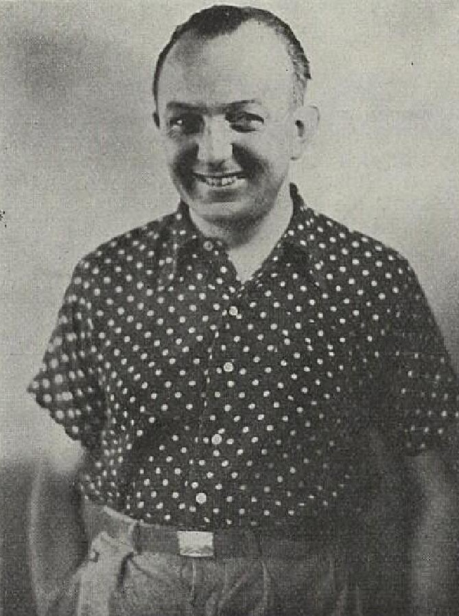 Jaroslav Veris (1900-1983), český akademický malíř, ilustrátor a autor divadelních výprav